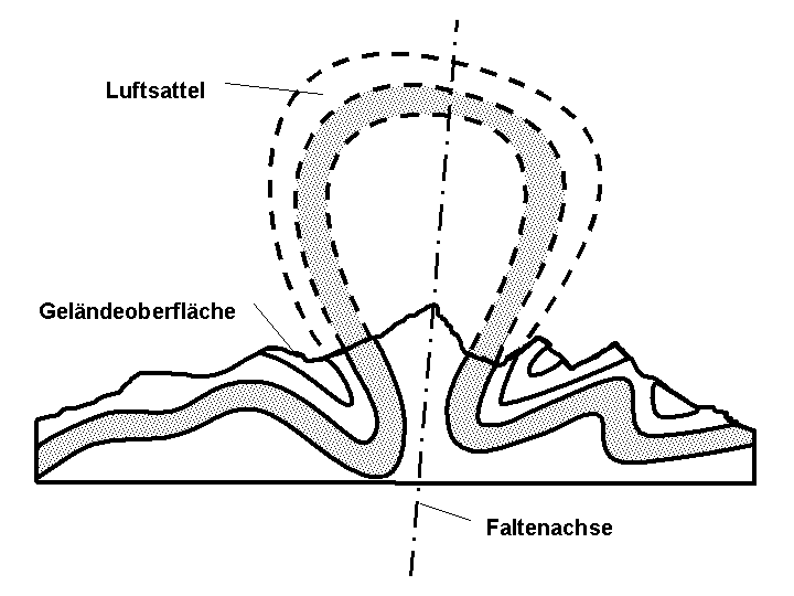 Ergänzung eines geologischen Schnittes um eine wahrscheinliche, im Lauf der Erdgeschichte ausgebrochene und durch Erosion abgetragene Sattelstruktur (Luftsattel).